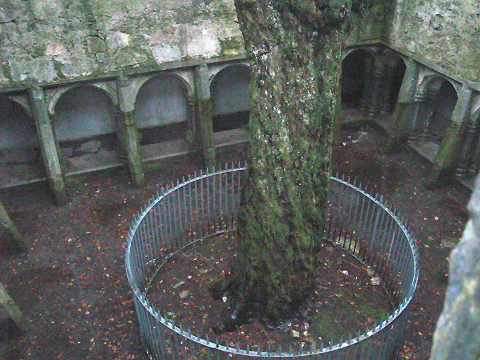 El patio enclaustrado de la Abadía de Muckross The cloistered courtyard of Muckross Abbey in Killarney National Park. Photograph taken by David Edgar in November 2005.